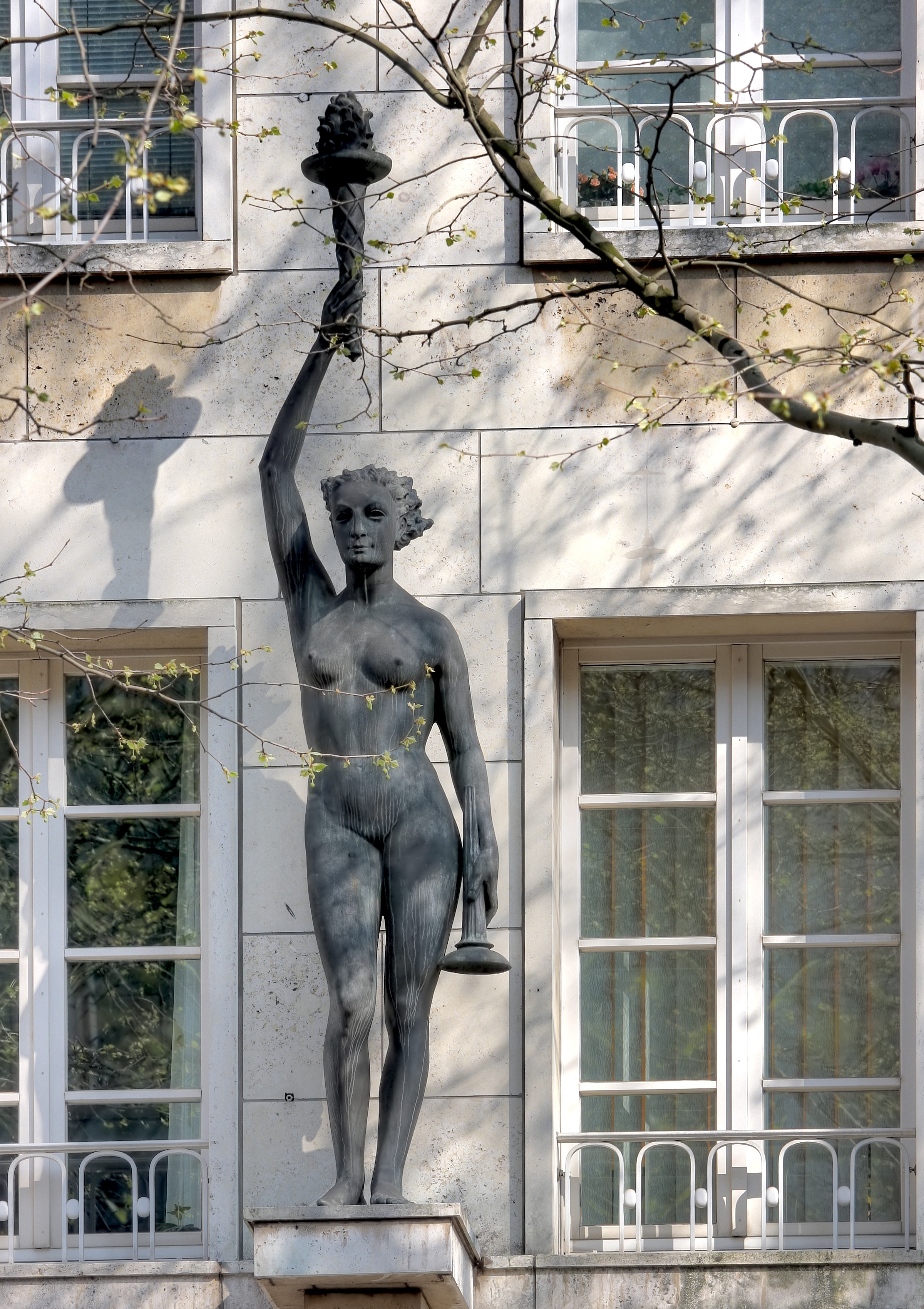 Die Fackelträgerin